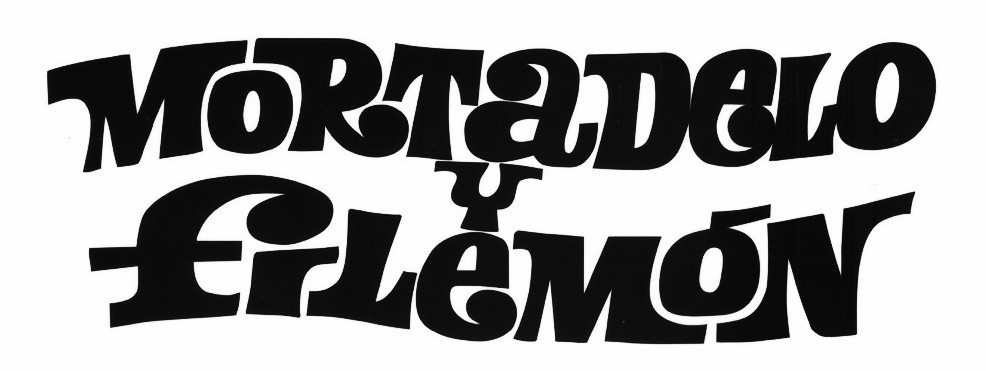 Logotipo de la serie de tebeos Mortadelo y Filemón.